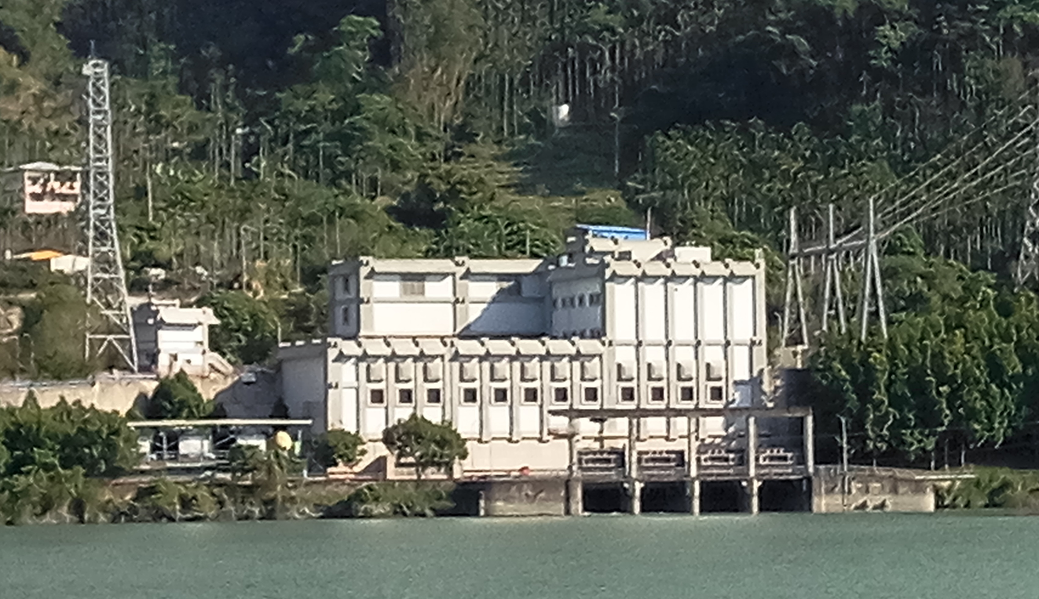 大甲溪發電廠馬鞍機組發電廠房遠觀